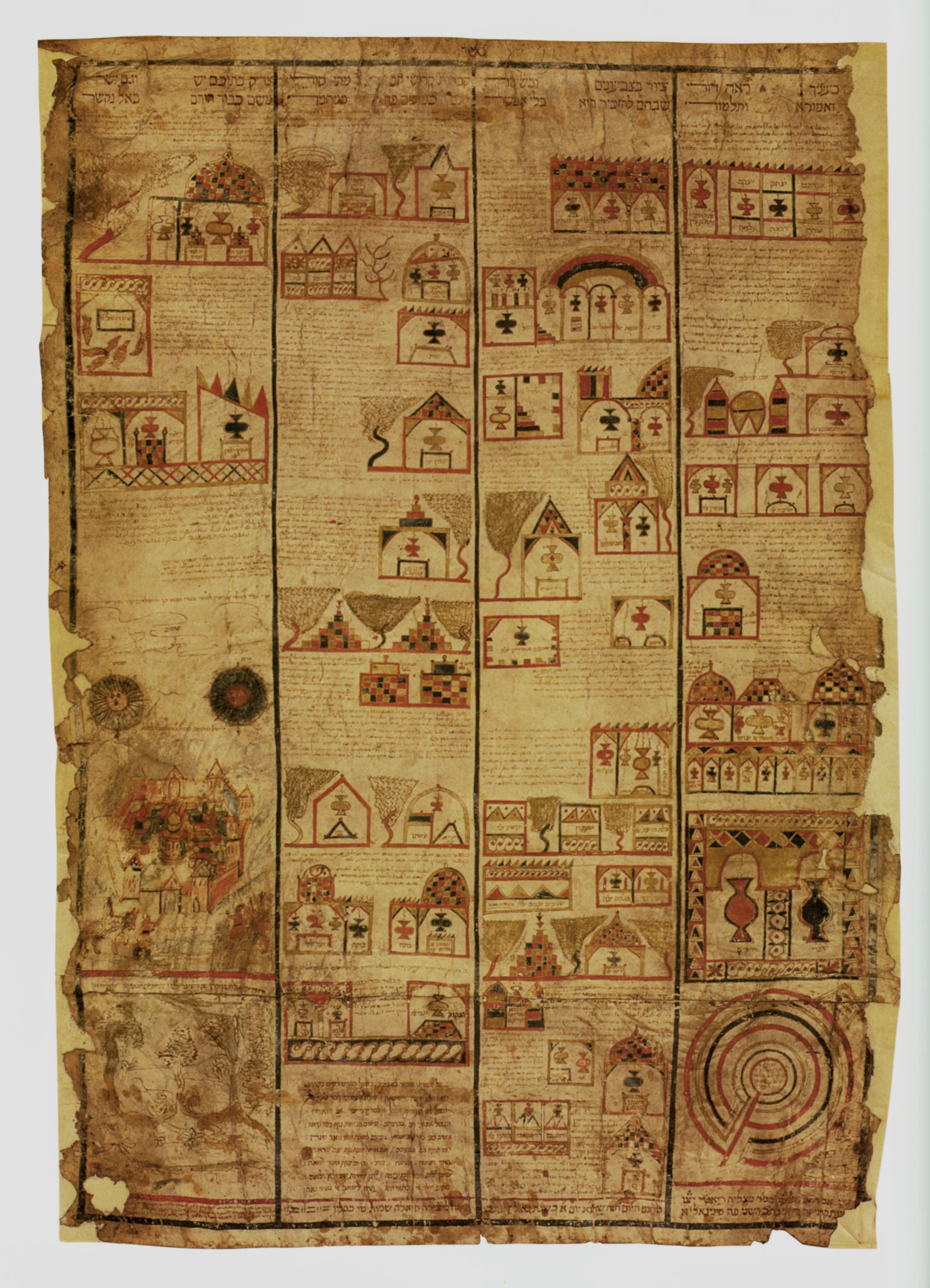 Manuscript